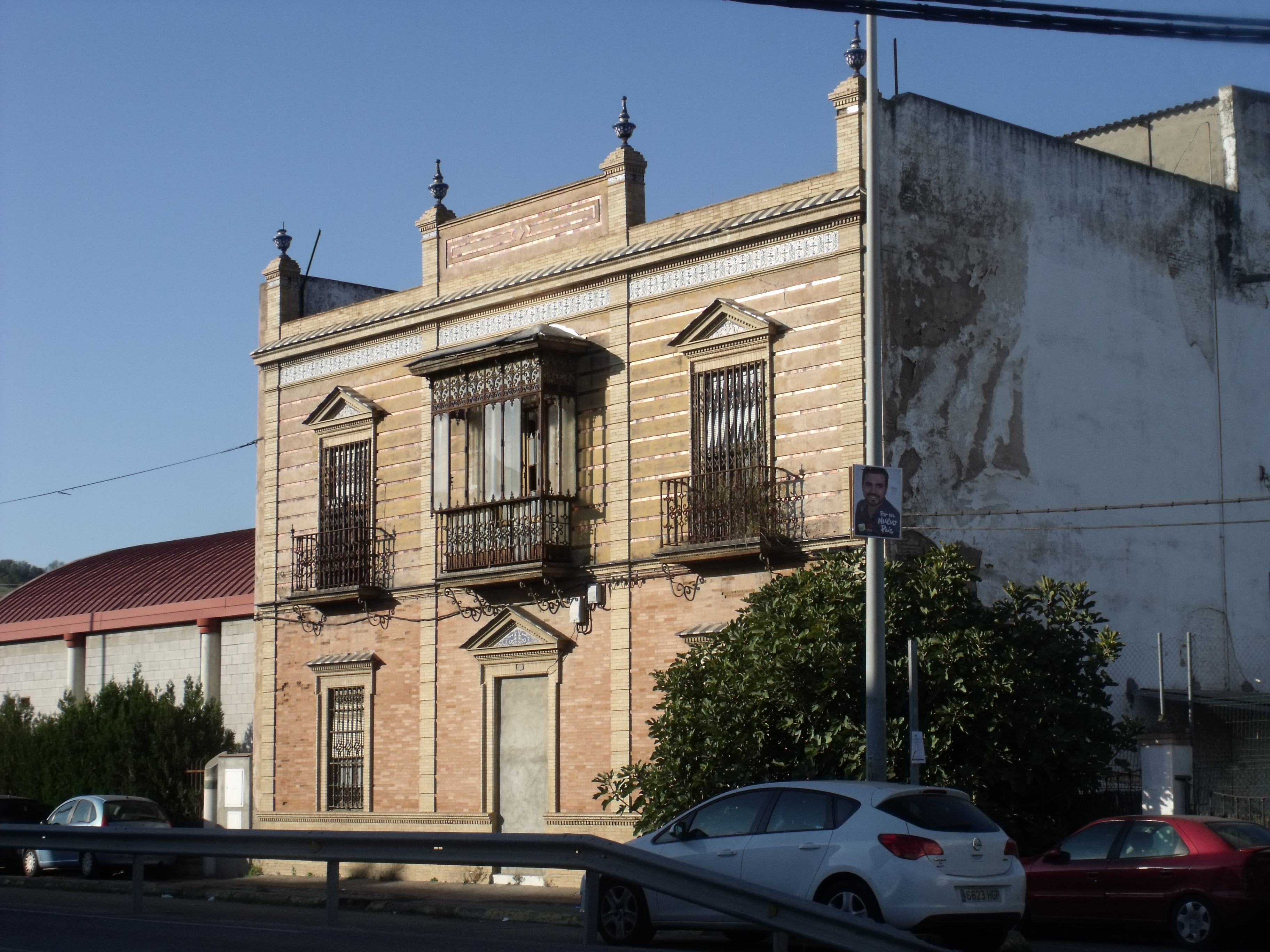 Lugar de la emboscada que acabó con la columna minera de Riotinto.